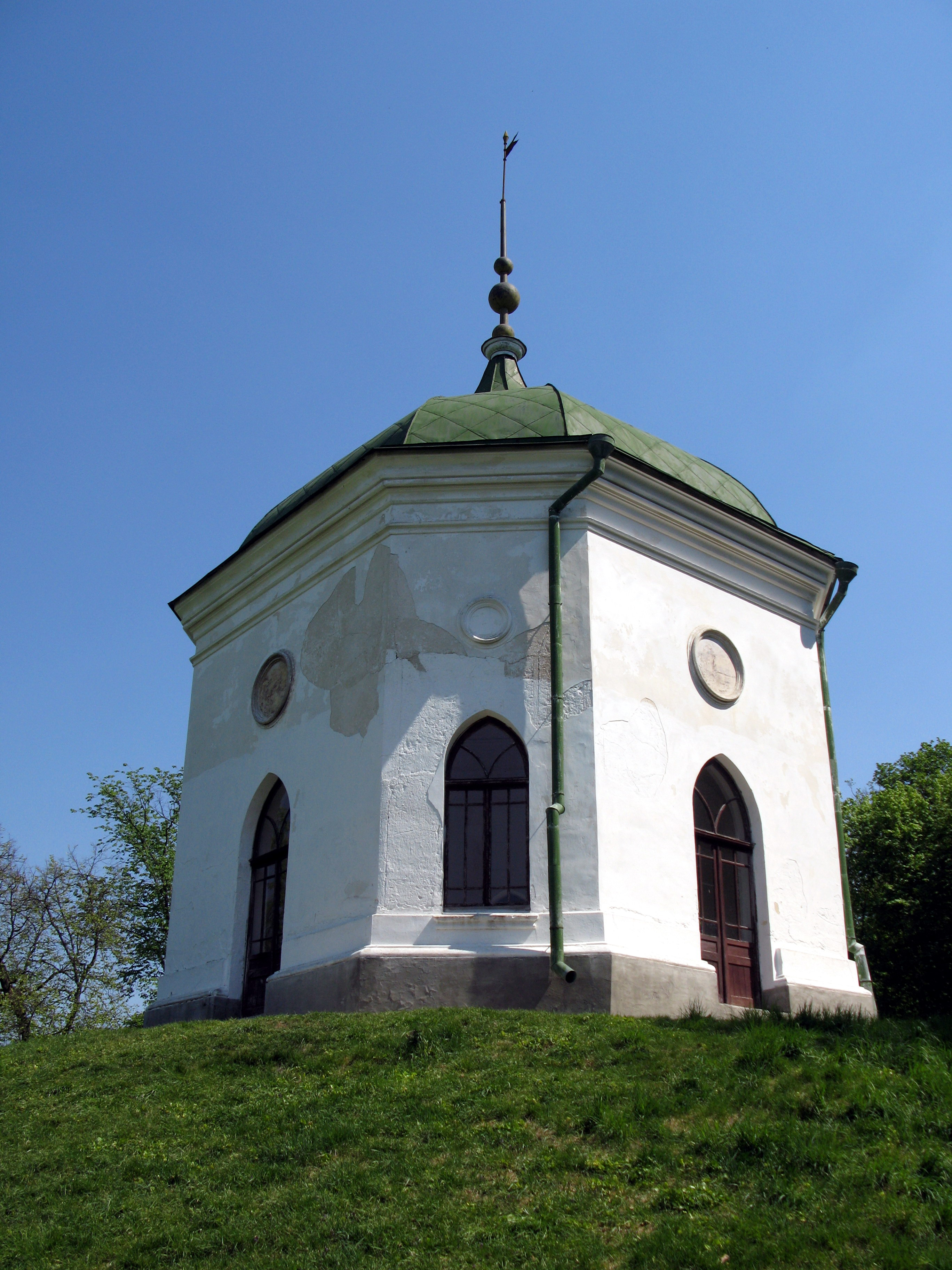 Павiльйон Глiнки (мур.), Качанiвка